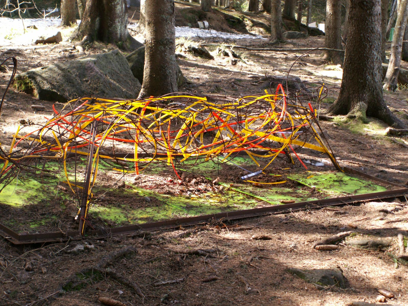 Ilse Teipelke, Der Tiger des Herrn von Grimmelshausen, 2000, Kunstpfad am Mummelsee, Deutschland, Baden-Württemberg, Ortenau-Kreis